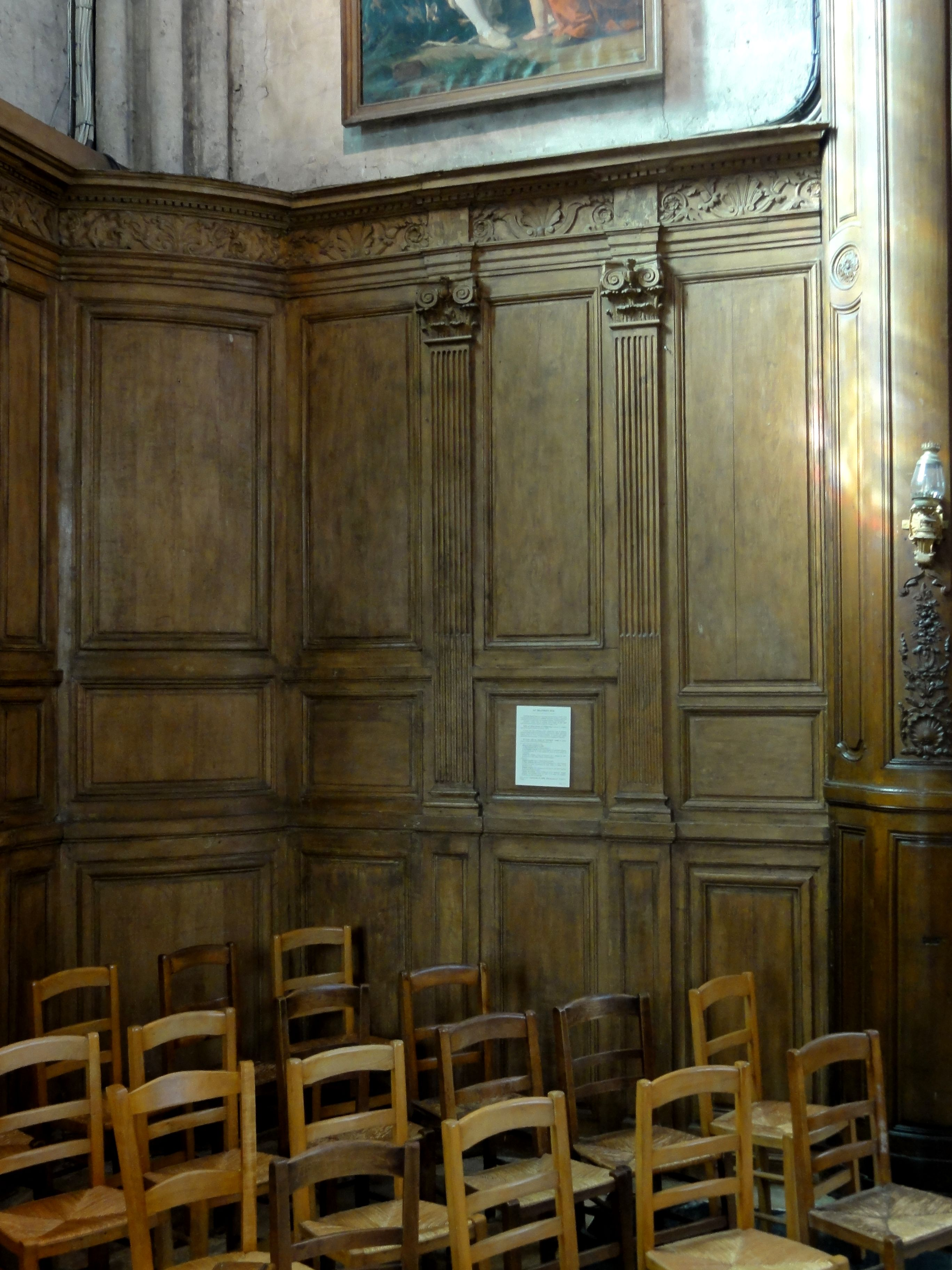 Lambris de la nef.